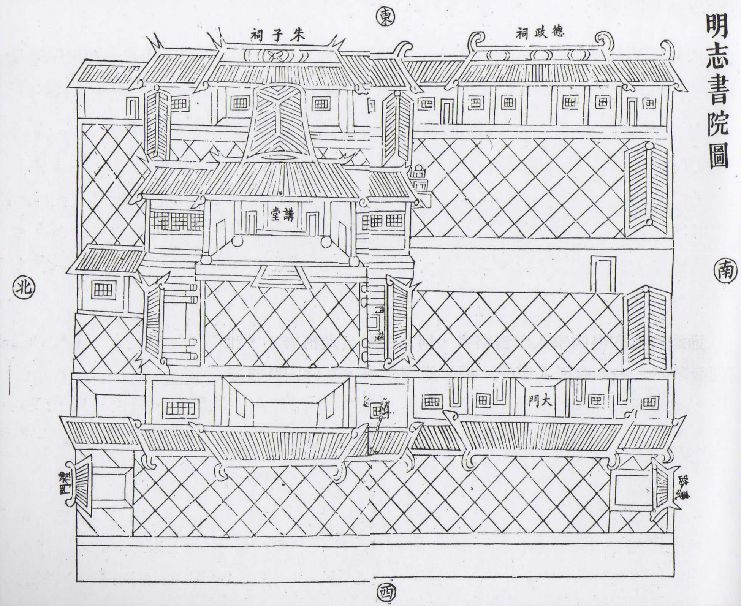 1781年遷建於淡水廳治(今新竹市)的明志書院圖